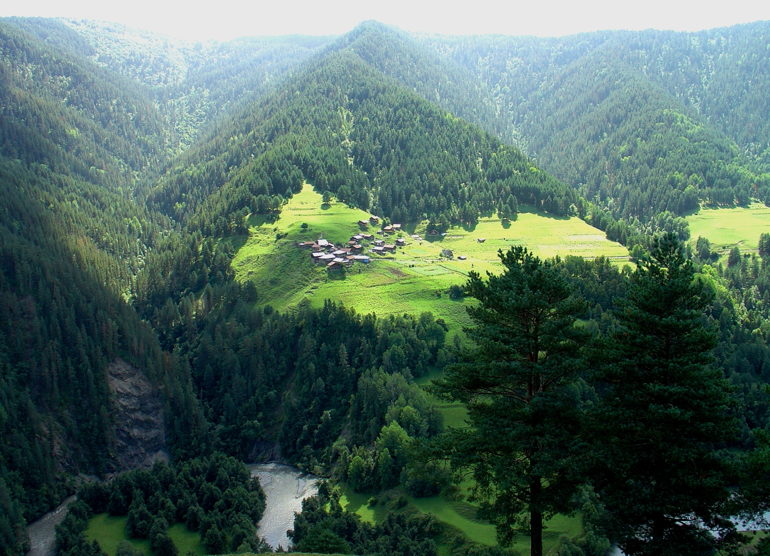 ქუმელაურთა